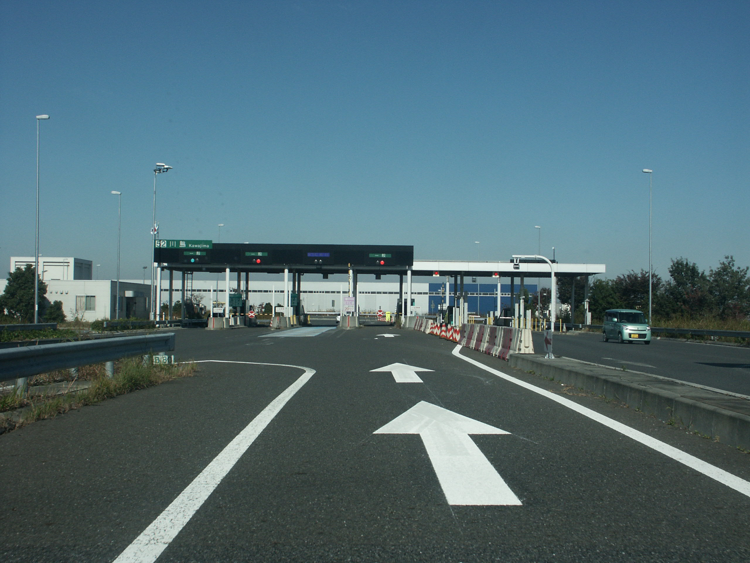 首都圏中央連絡自動車道川島IC料金所